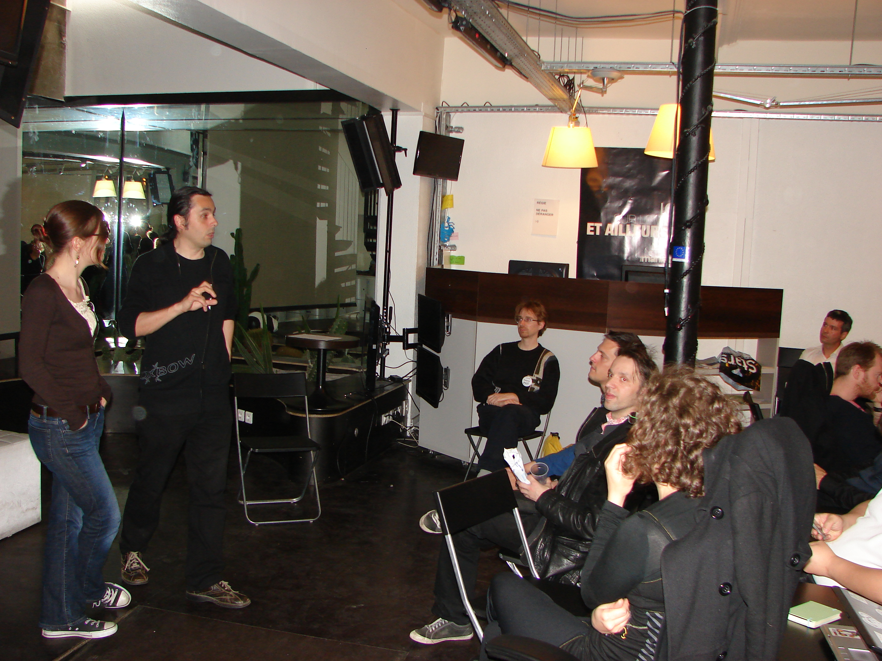 Intervention de Frédéric Couchet lors de l'April Entreprise Camp à La Cantine le jeudi 3 mai 2012